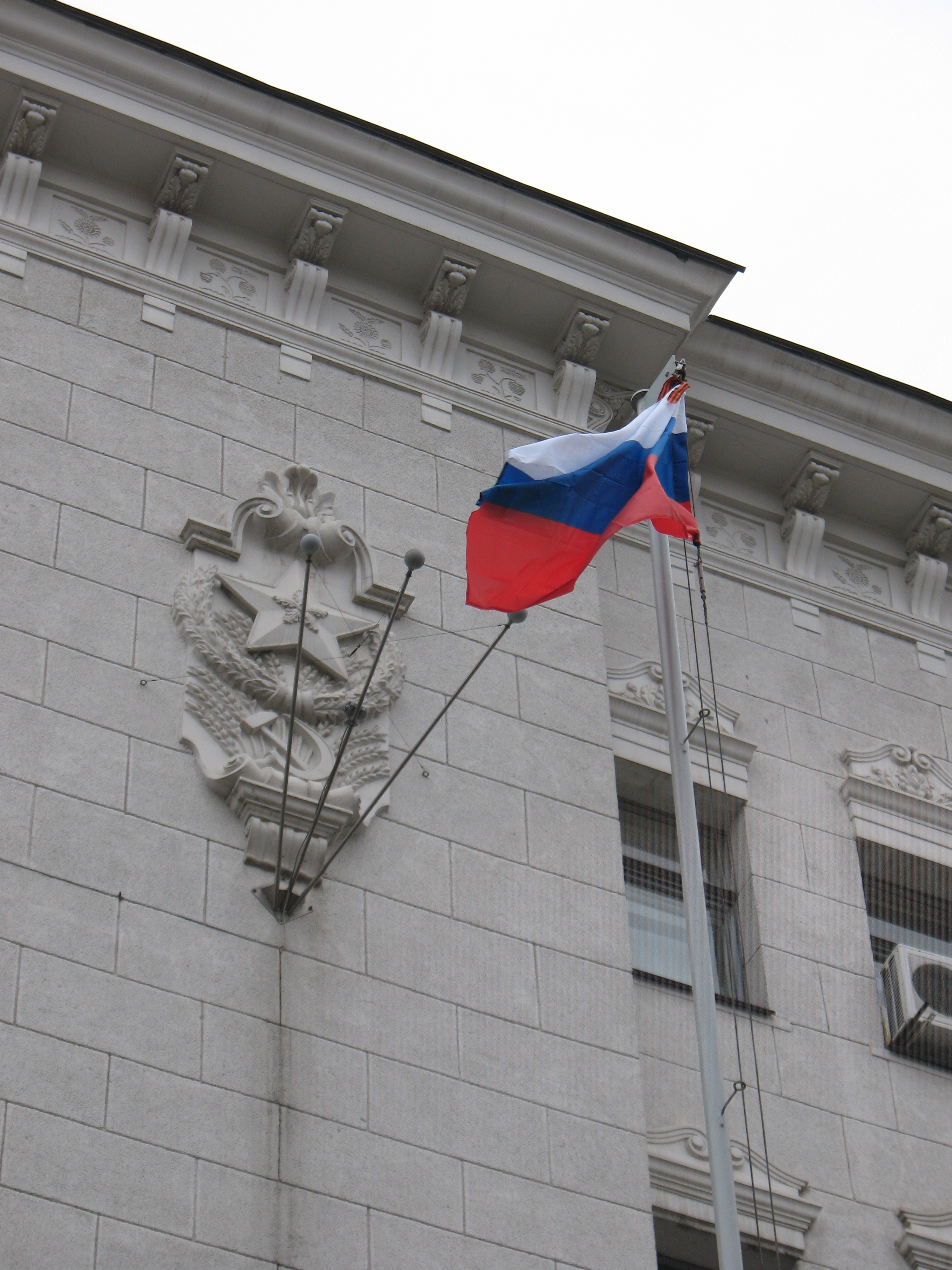 Харьков, 26 февраля. Антинационалистический митинг перед зданием Харьковского городского совета, где проходит внеочередная сессия. На флагштоке поднят флаг России (один из четырёх; остальные - Украины, Харькова и области).